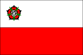 Vlag van de gemeente Baelen.